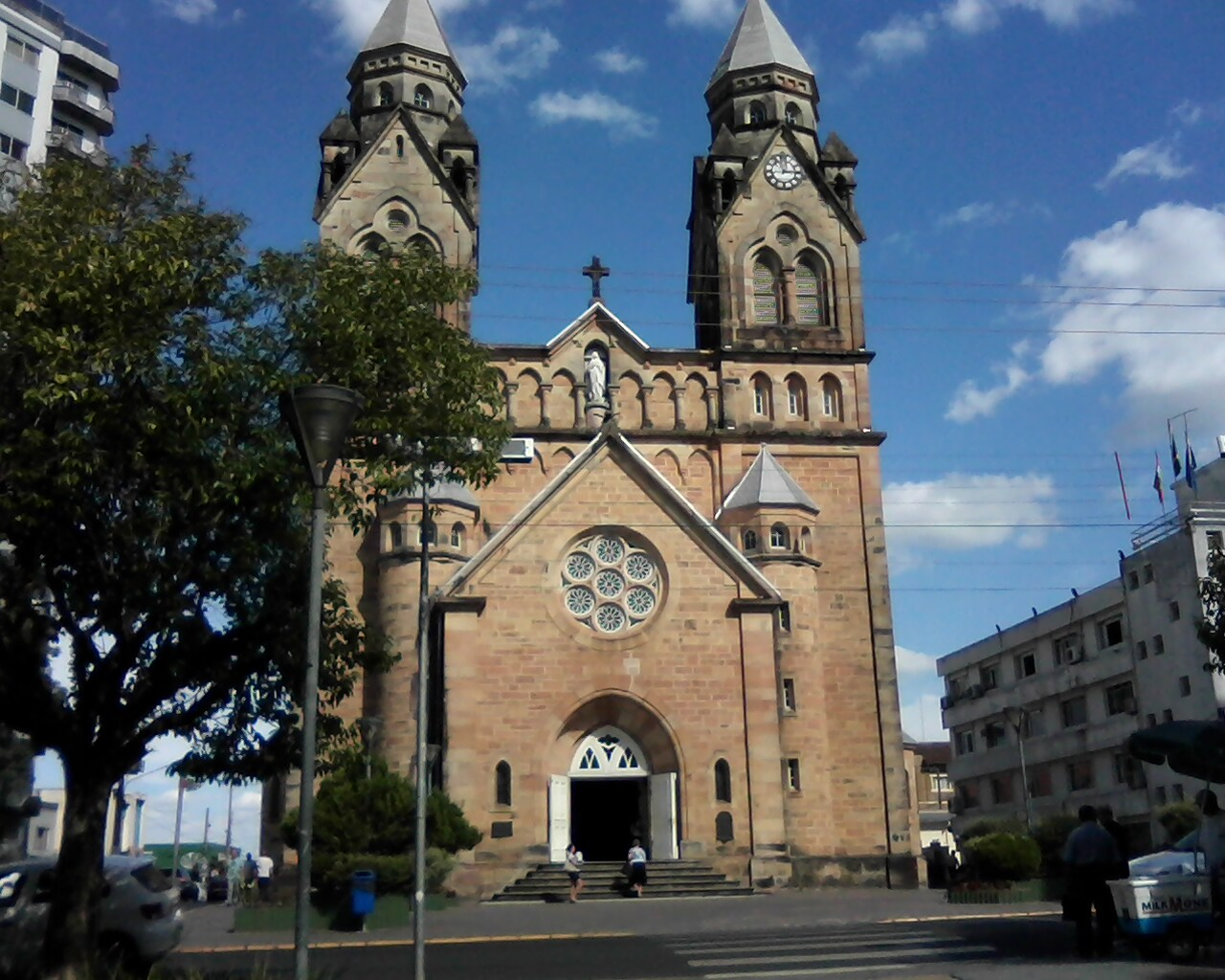 Catedral de Lages,SC